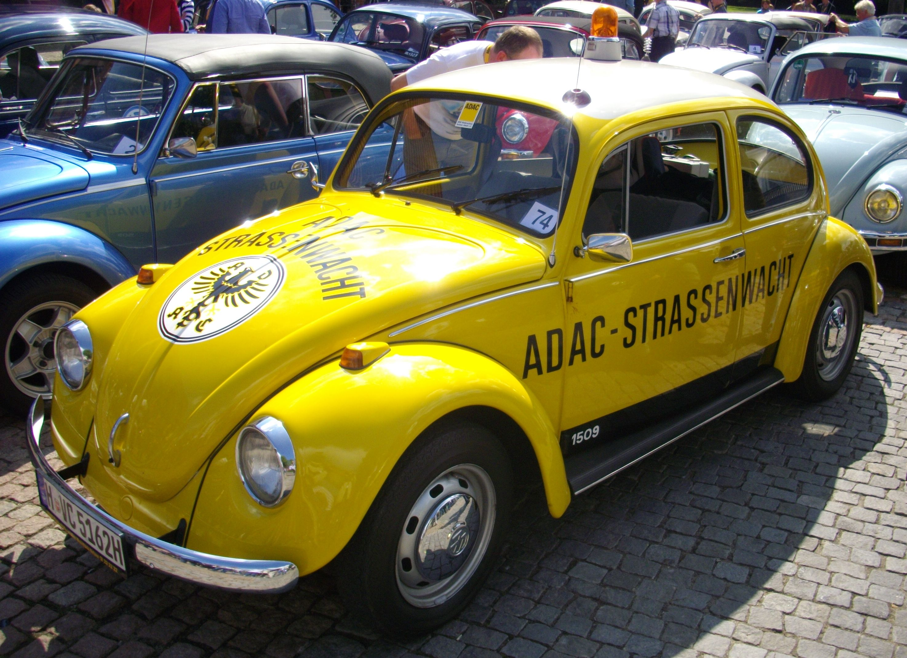 Der ADAC-Käfer